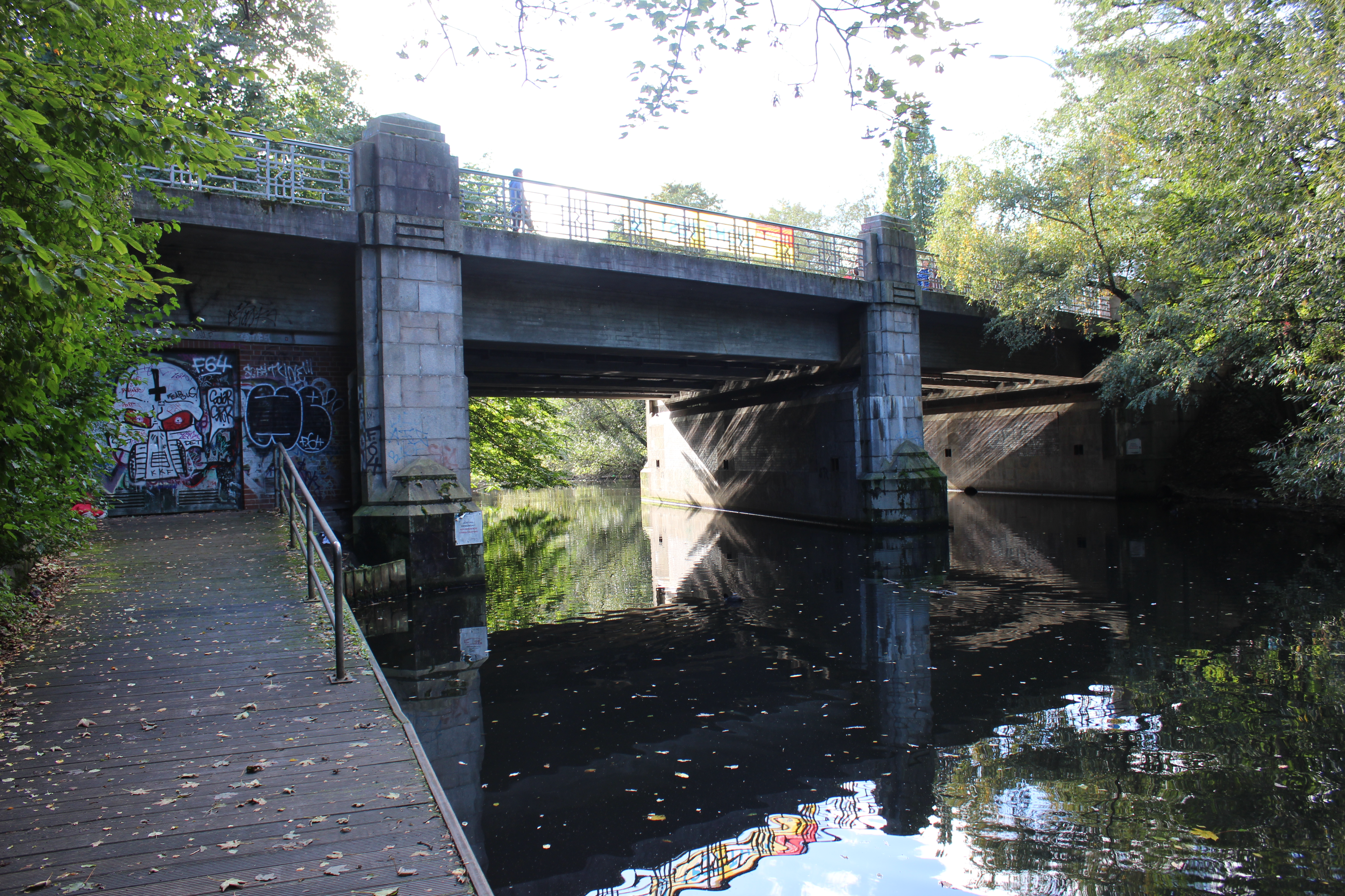 Straßenbrücke über Gewässer in Hamburg-Eimsbüttel